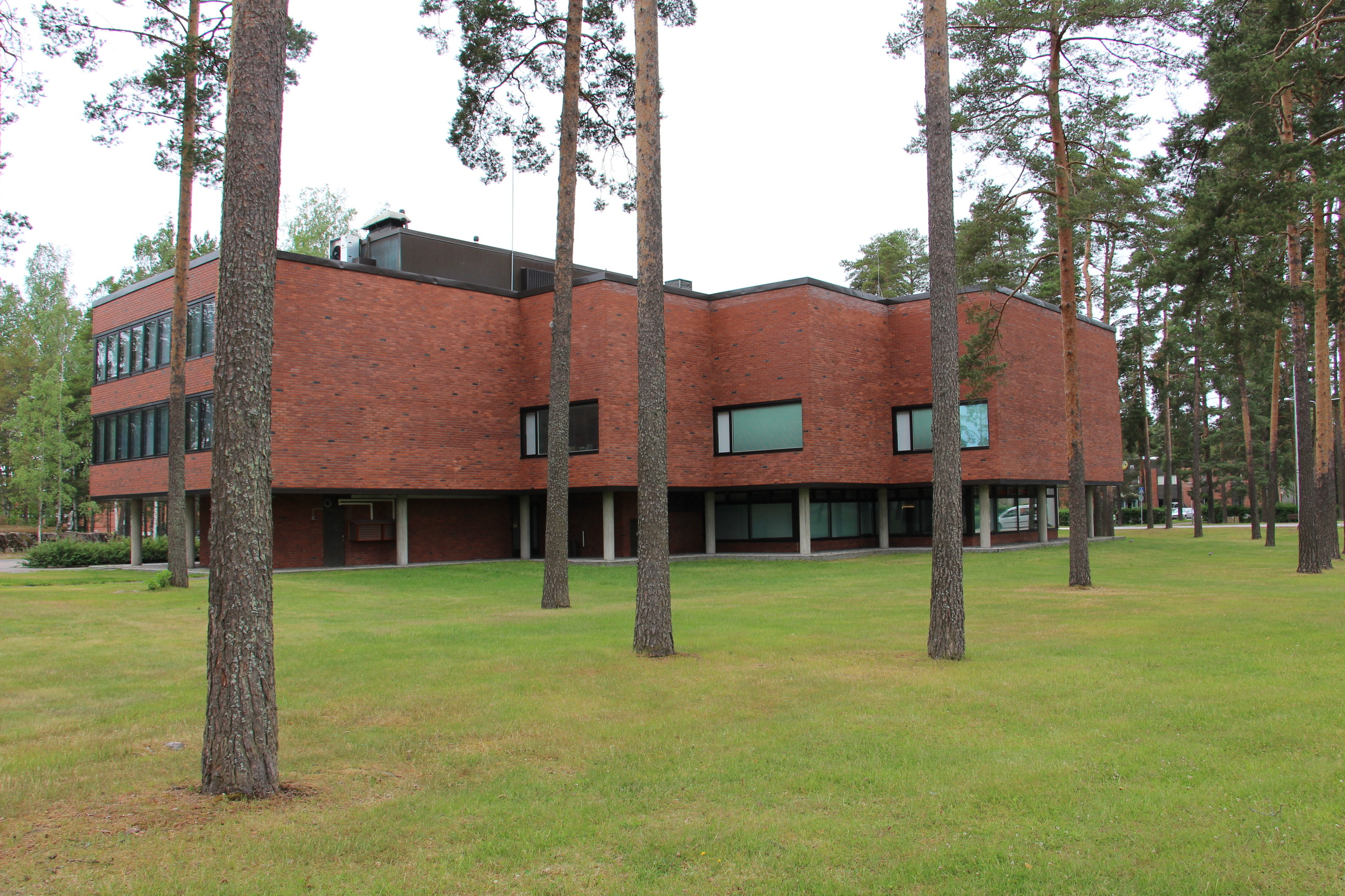 Kankaanpään kaupungintalo. Heikki ja Kaija Siren 1967.